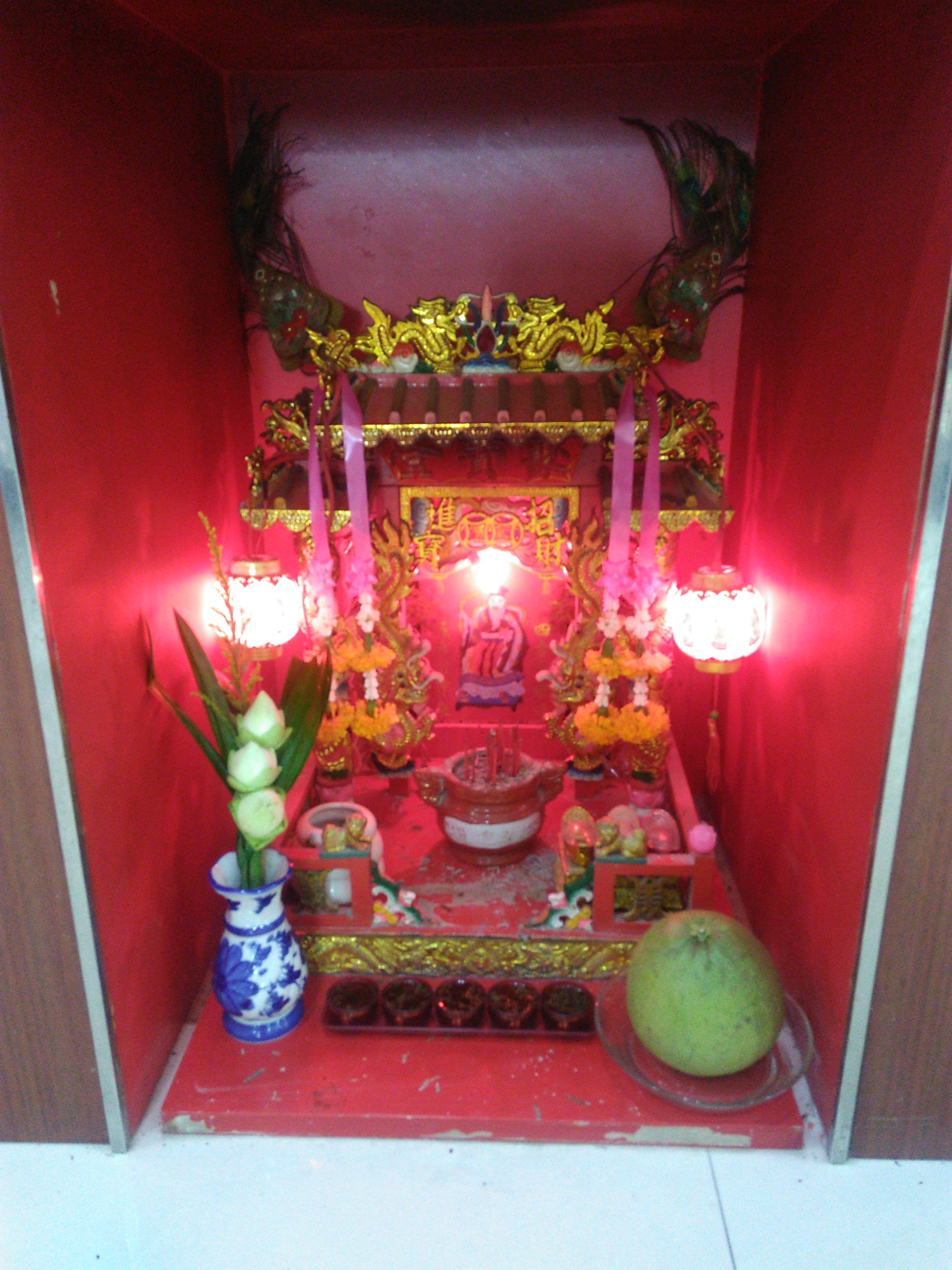 Altar Tho Ti Kong di sebuah toko di Pattaya, Agustus 2016